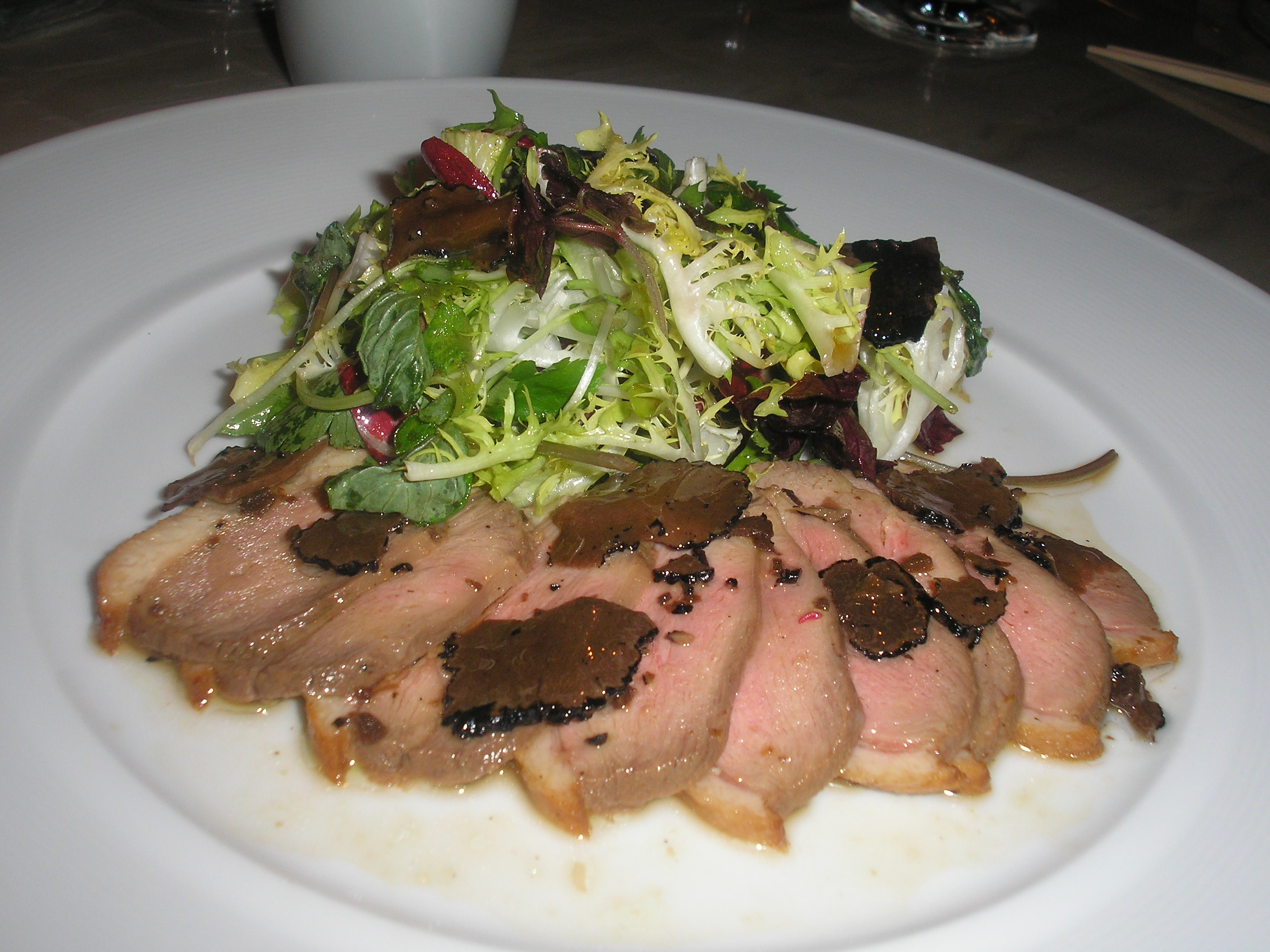 Émincé de canard truffé